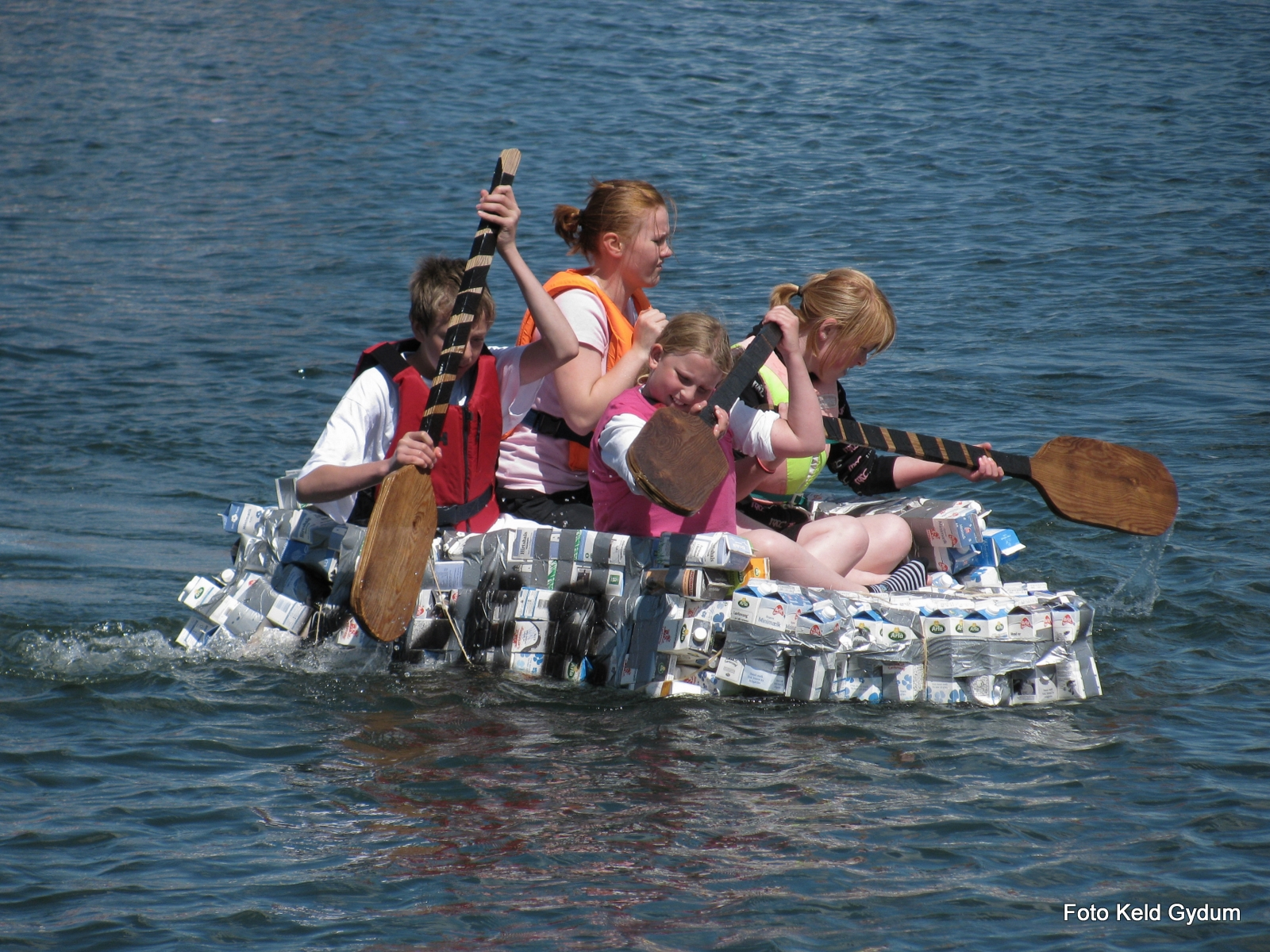 åbent hus frederikshavn havn 13. juni 2009